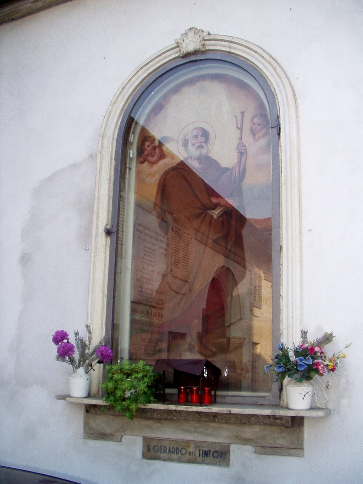 Altarolo dedicato a San Gerardo de'Tintori, patrono di Monza, sul muro esterno della sua casa